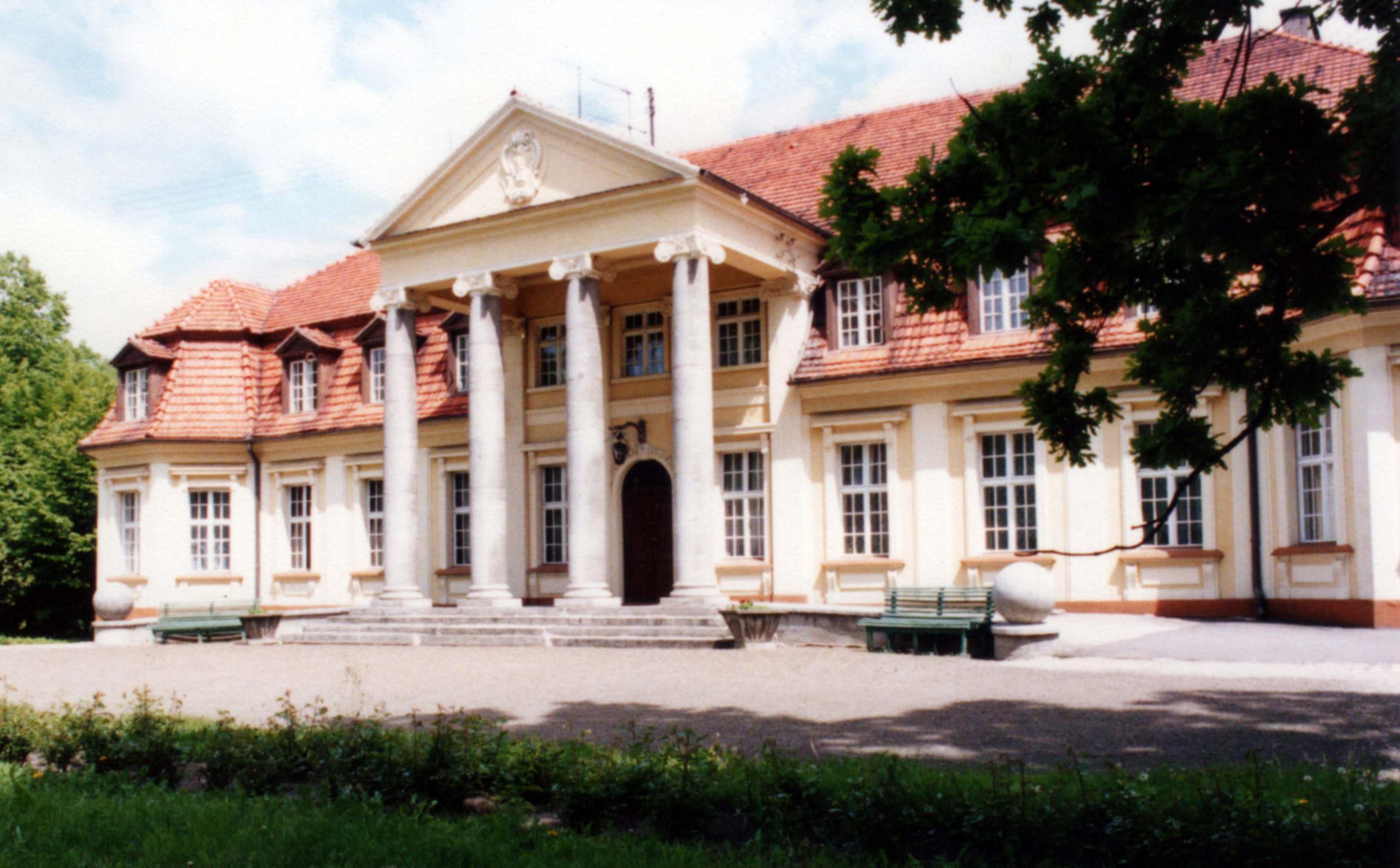 Pałac w Bieganowie k. Wrześni wybudowany w latach 1914-1916 przez Edwarda Grabskiego h. Wczele (zabytek nr rejestr. 1444/A)